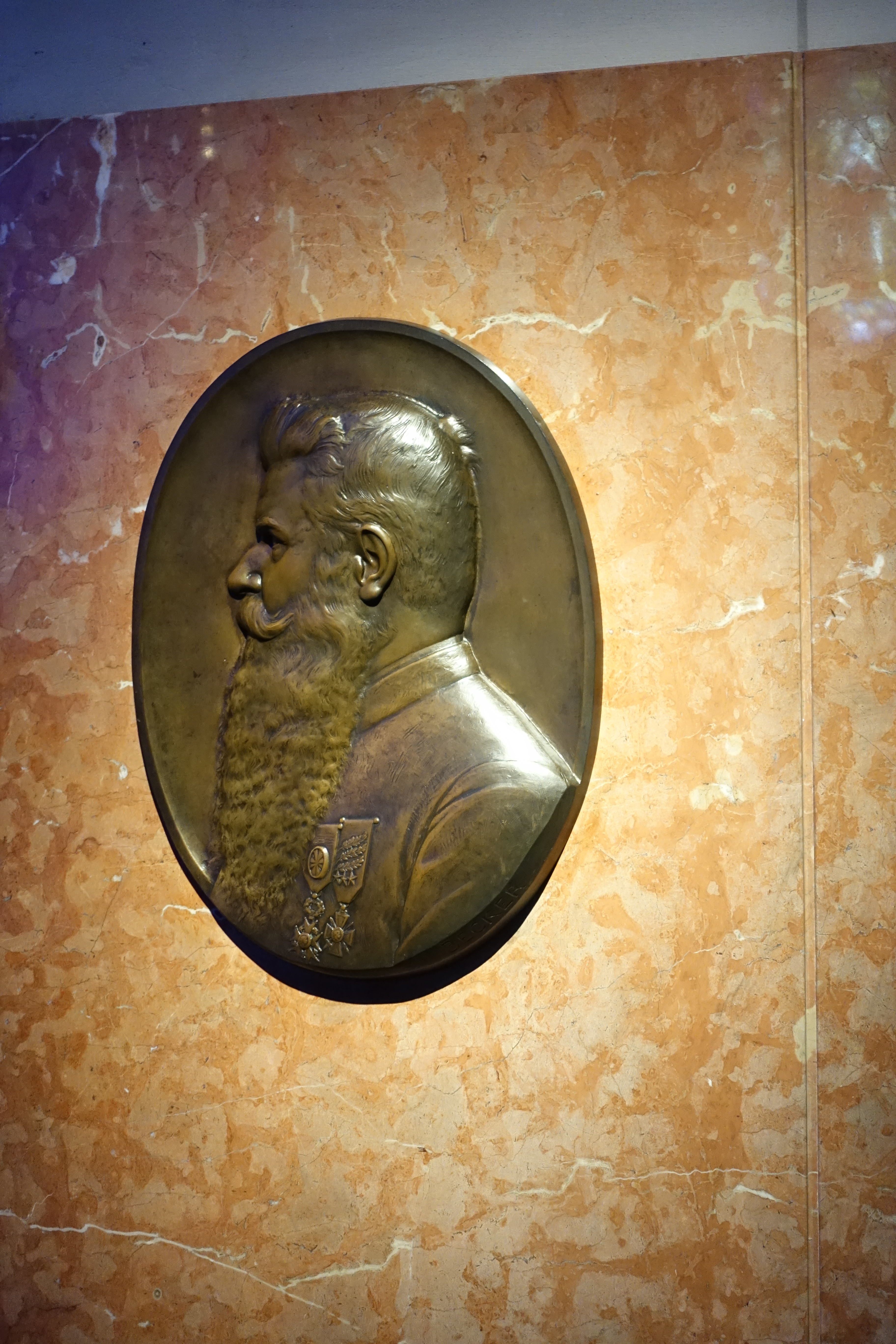 Tomb of Daniel Brottier @ Sanctuaire Sainte-Thérèse @ Jardin de la Fondation d'Auteuil @ Paris Chapelle Sainte-Thérèse de la fondation d'Auteuil, Paris, France.